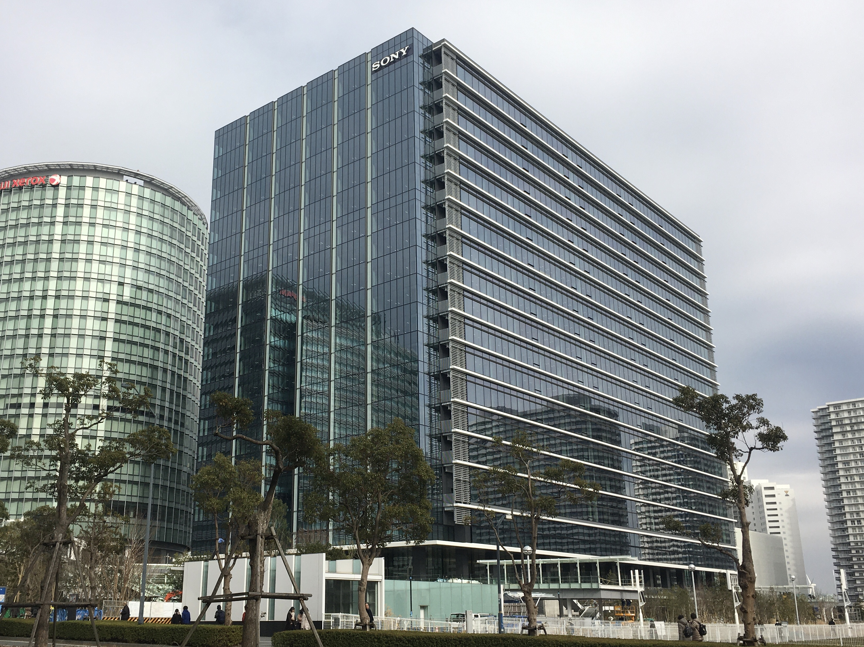 みなとみらい地区のオフィスビル「横浜グランゲート」。南西側からの外観。